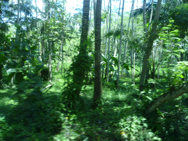 Hutan di Indonesia.